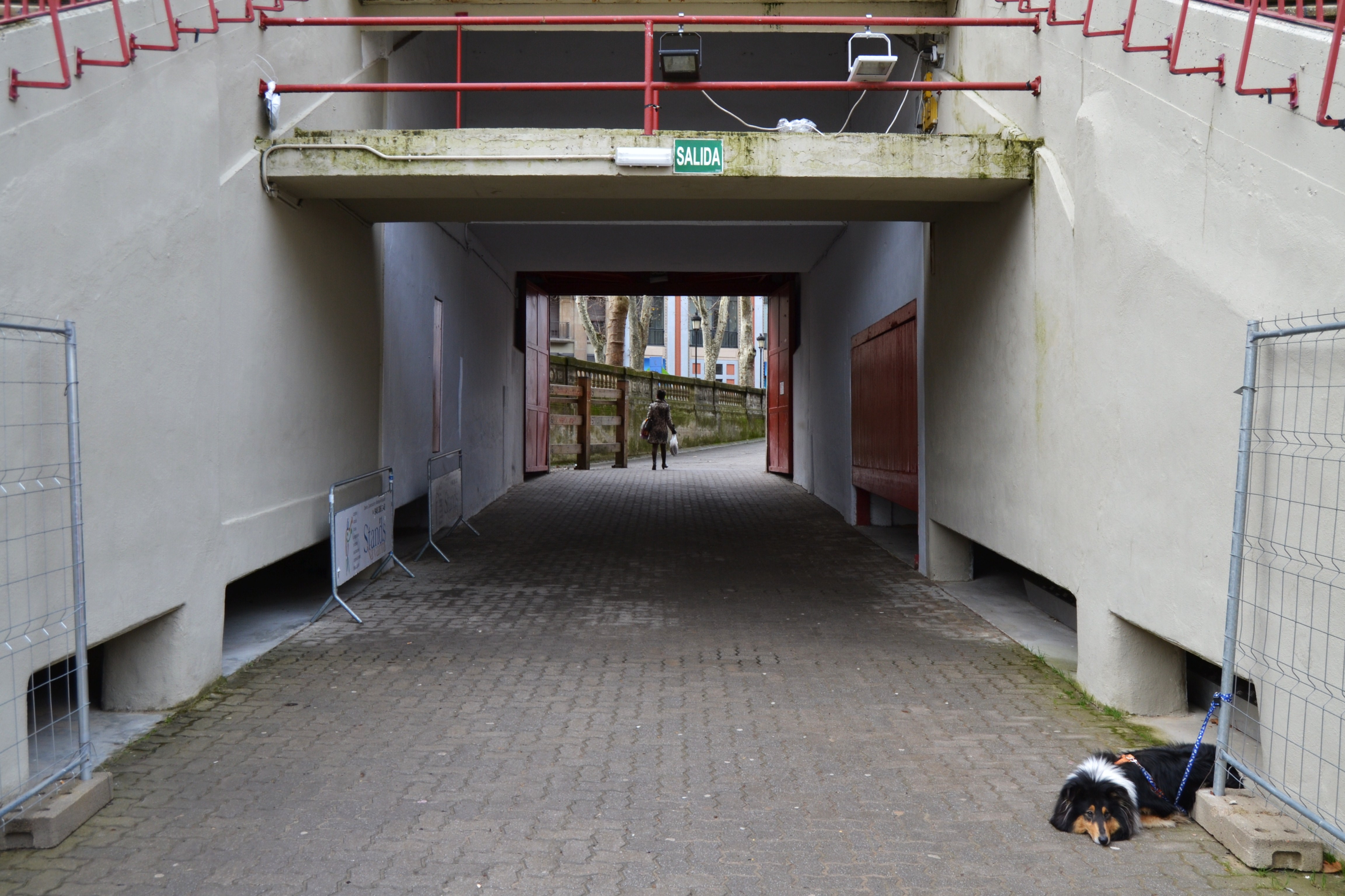 Entrada a la plaça de bous de Pamplona.